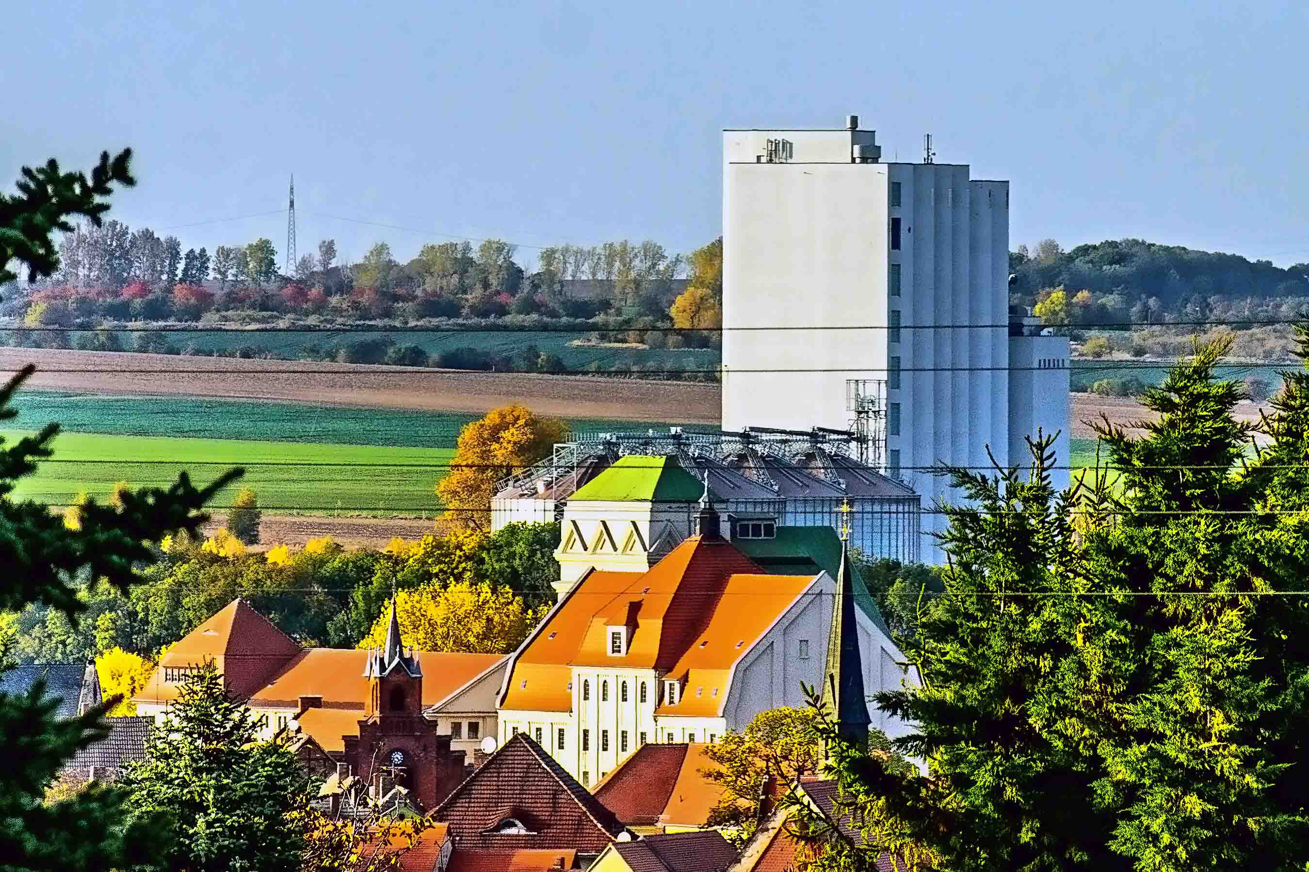 Blick von der Wasserturmstraße zum Rathaus, Alte u. Neue Saalemühle Alsleben (Saale)